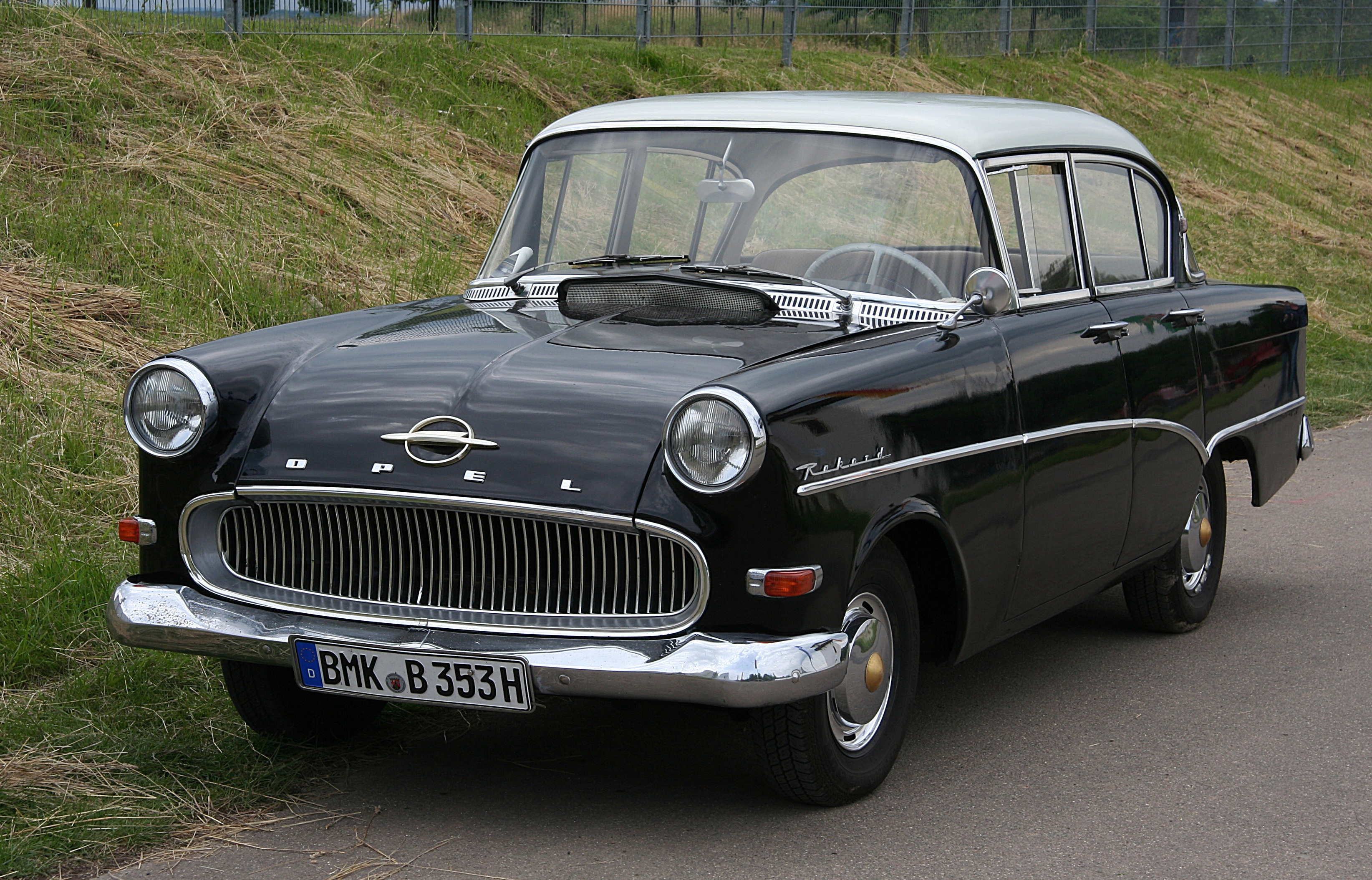 Opel Rekord 1700 – P1; Lüftungsklappe vor der Frontscheibe offen (Kennzeichen verändert)